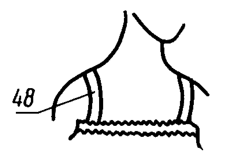 Изображение из ГОСТ 22977-89 (СТ СЭВ 6484-88) — Детали швейных изделий. Термины и определения.